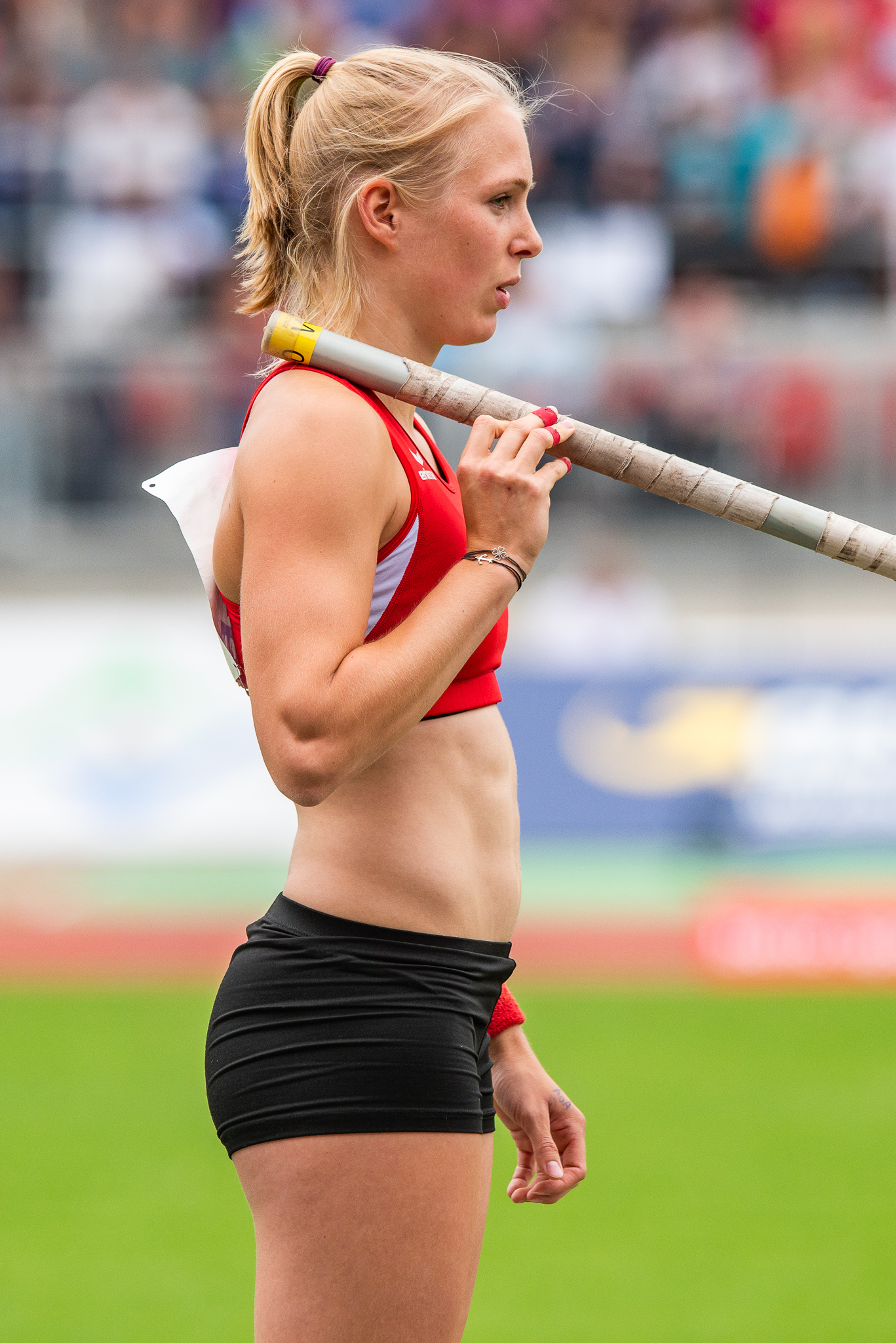 Anjuli Knäsche,DLV,Deutsche Leichtathletik Meisterschaften 2018,Deutscher Leichtathletik-Verband,Max-Morlock-Stadion,Pole vault,SG TSV Kronshagen/Kieler TB,Stabhochsprung